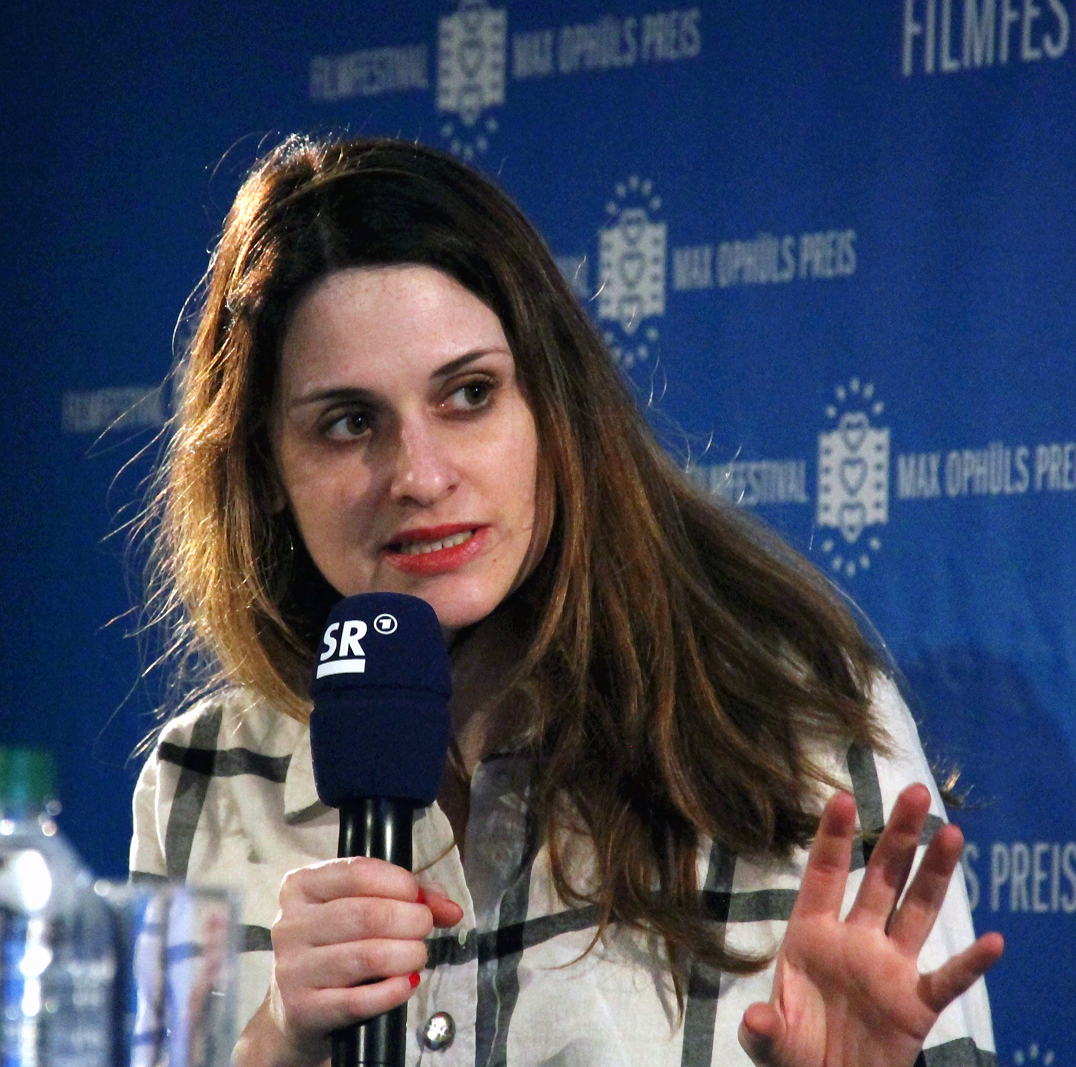 Julia Becker beim SR-Midnight Talk auf dem Max-Ophüls-Festival 2015